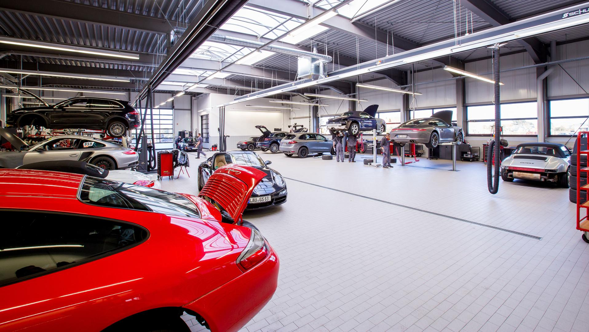 Innenansicht einer Werkstatt eines Porsche Zentrums